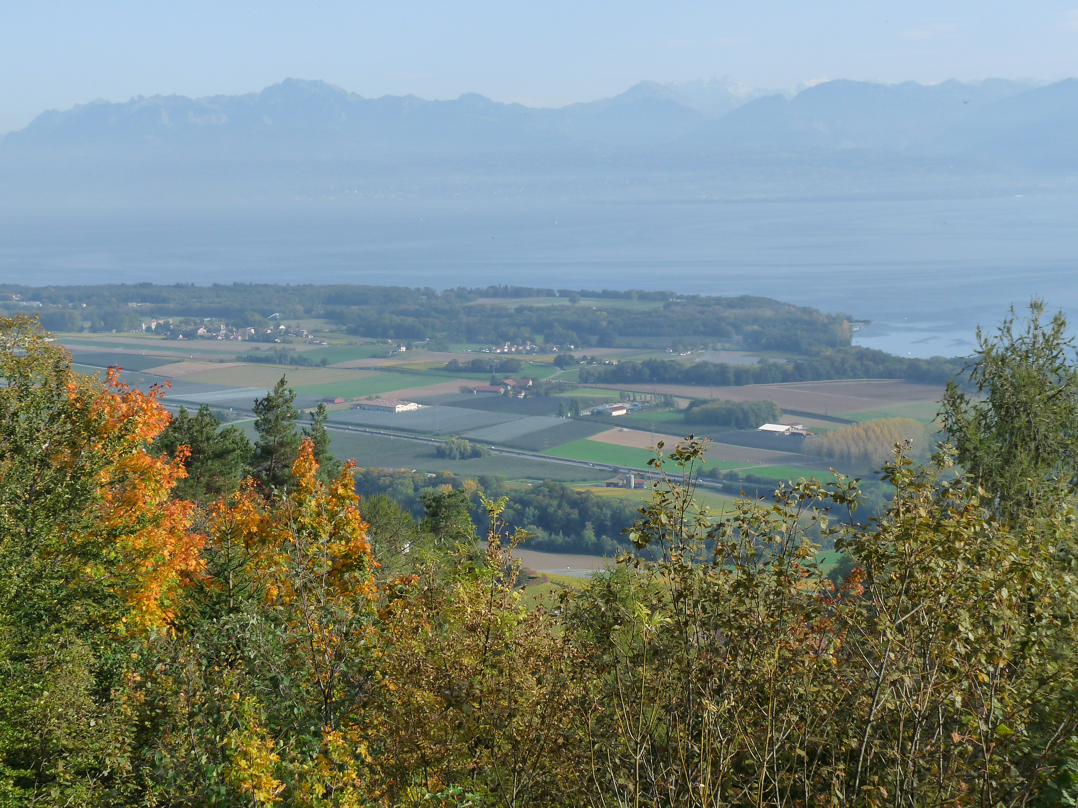 Vue sur la lac Léman et les Alpes françaises au parc du Pré-Vert au Signal de Bougy (canton de Vaud, Suisse)